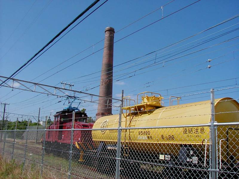 三池炭鉱宮浦坑のれんが煙突と、その横を走る旧三池炭鉱専用鉄道（現：三井化学専用鉄道）です。れんが煙突は明治２１（１８８８）年の建造で国の登録文化財。専用鉄道の電気機関車は昭和12（1937）年東芝製の４５ｔ電気機関車です。三井化学専用鉄道は現役で毎日運行されています。